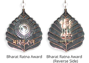 பாரத ரத்னா பட்டம்